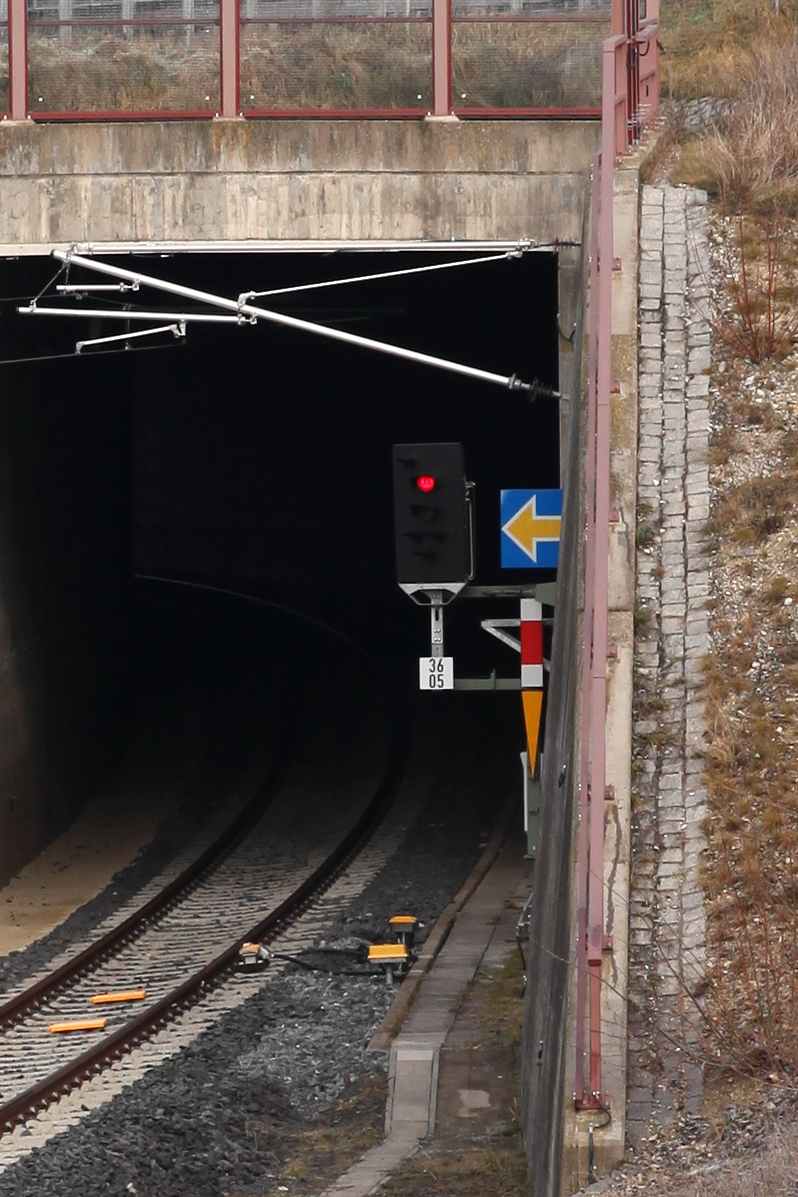 Verbindungskurve Dörfles-Esbach, Kreuzungsbauwerk Südseite